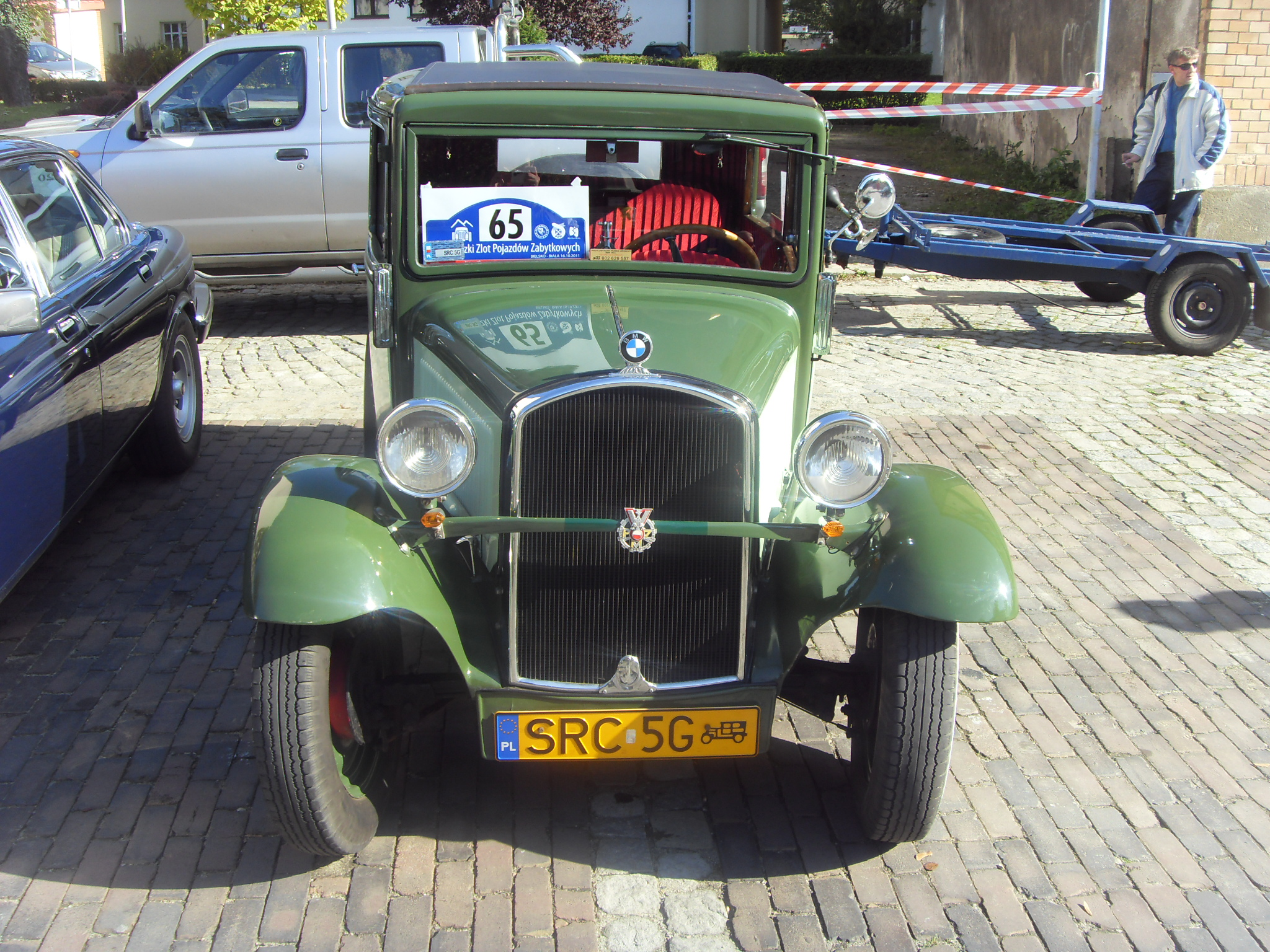 BMW AM4 na II Beskidzkim Zlocie Pojazdów Zabytkowych